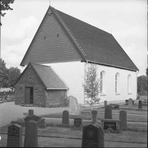 Kyrkan mot sydväst. Kategori: (01) ExteriörerKyrkan mot sydväst.